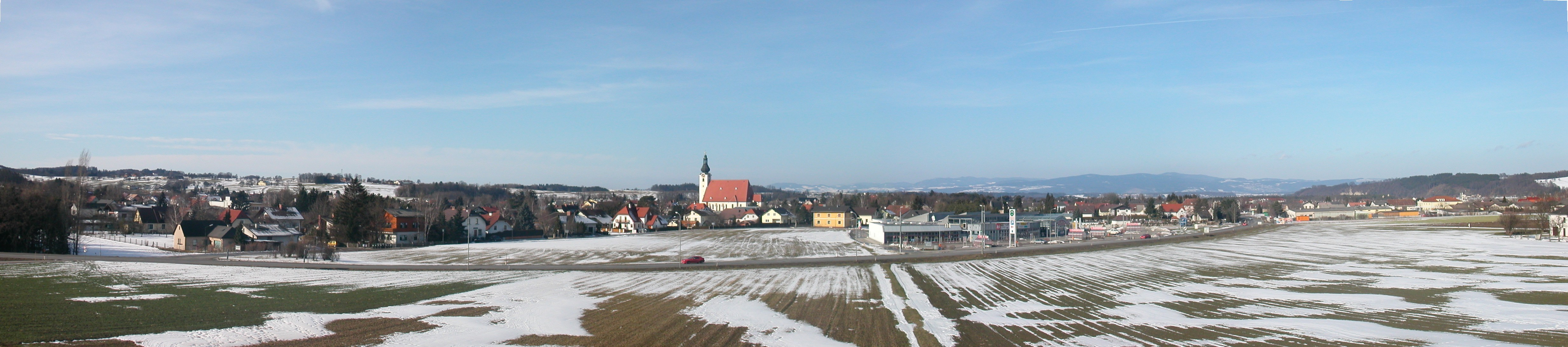 Purgstall an der Erlauf NÖ - Panorama aus südostlicher Richtung